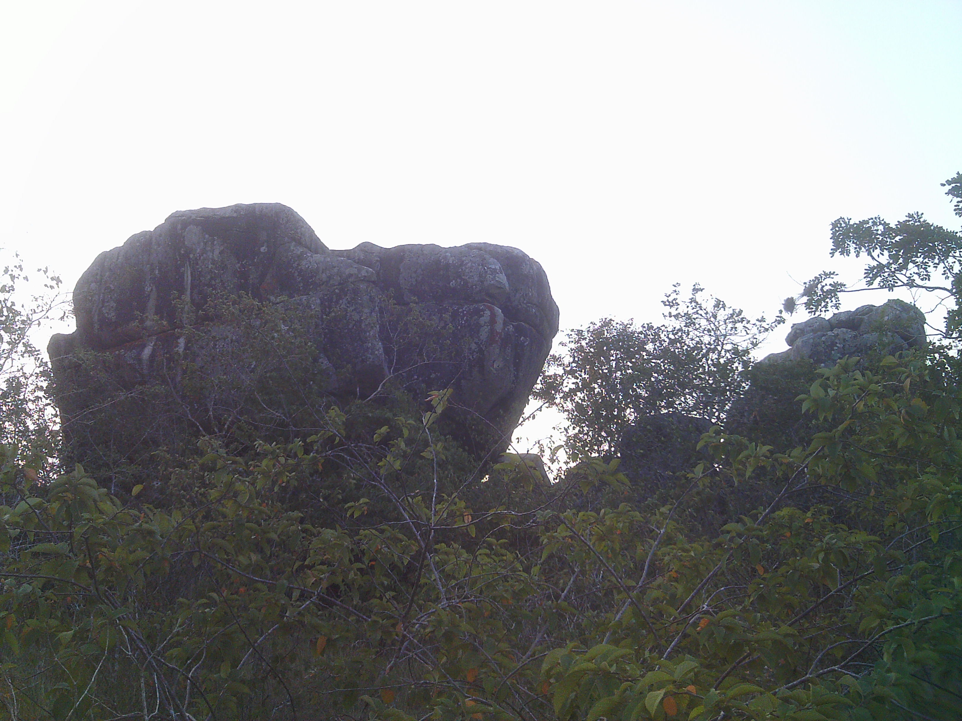 Rocha granítica como resíduo do processo de remoção do manto de intemperismo ao longo do tempo. Essa formação é muito comum em regiões semi-áridas. A "Pedra" do Negro, como é conhecida popularmente na região, levou esse nome porque, para muitos, serviu de refúgio para um escravo, tempos atrás. Fica próximo ao povoado Lagoa do Roçado, em Monte Alegre.